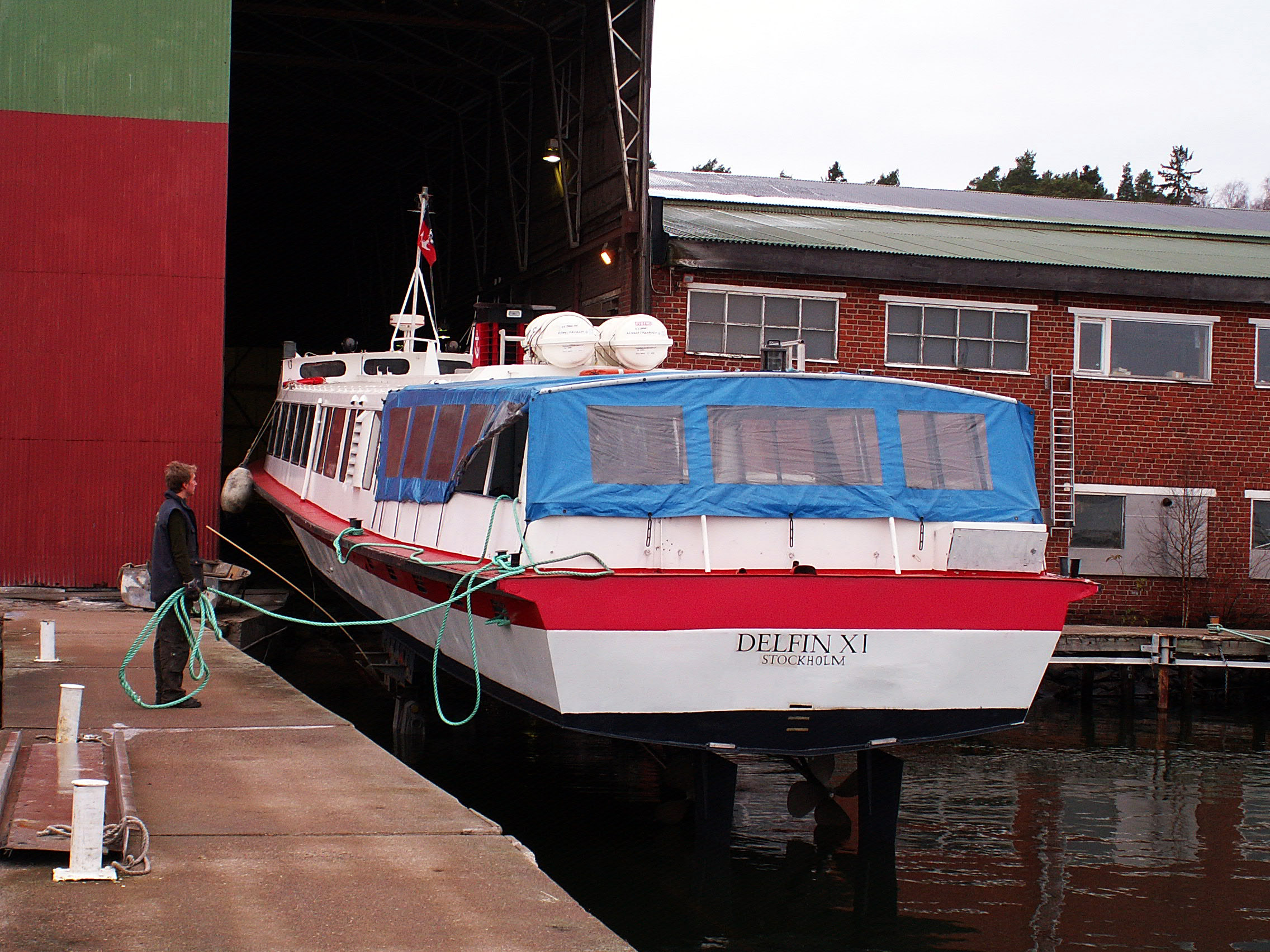 Boghammar Marin, Lidingö, Sverige